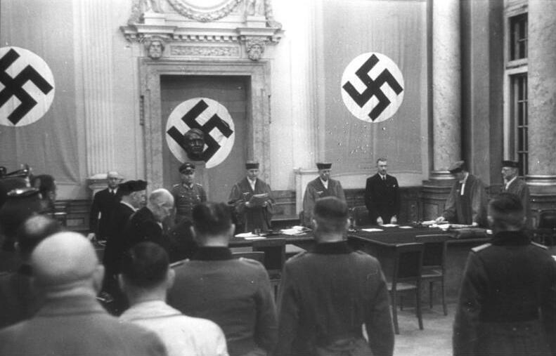 Volksgerichtshof, Reinecke, Freisler, Lautz Berlin - Volksgerichtshof, Prozeß nach dem 20. Juli 1944; Hermann Reinecke, Roland Freisler, Heinrich Lautz Abgebildete Personen: Reinecke, Hermann: General der Infanterie, Ritterkreuz (RK), Heer, Beisitzer Prozeß 20.Juli 1944, Deutschland (GND 133719561) Freisler, Roland Dr.: Präsident des Volksgerichtshofes, Deutschland Lautz, Heinrich: Oberreichsanwalt am Volksgerichtshof, Deutschland